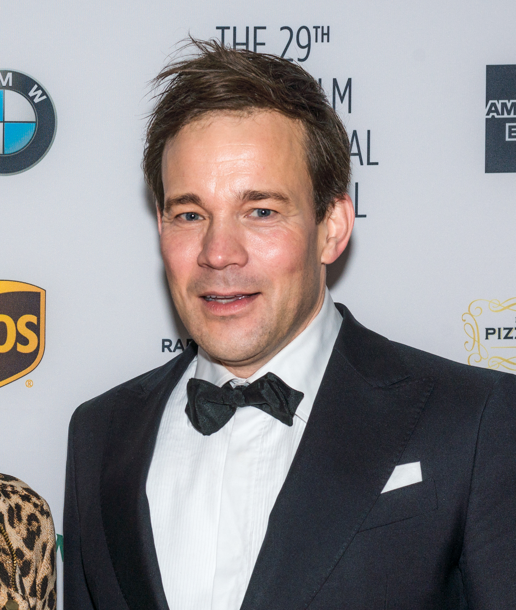 Johannes Bah Kuhnke på röda mattan inför prisutdelningen på Stockholms internationella filmfestival den 16 november 2018.